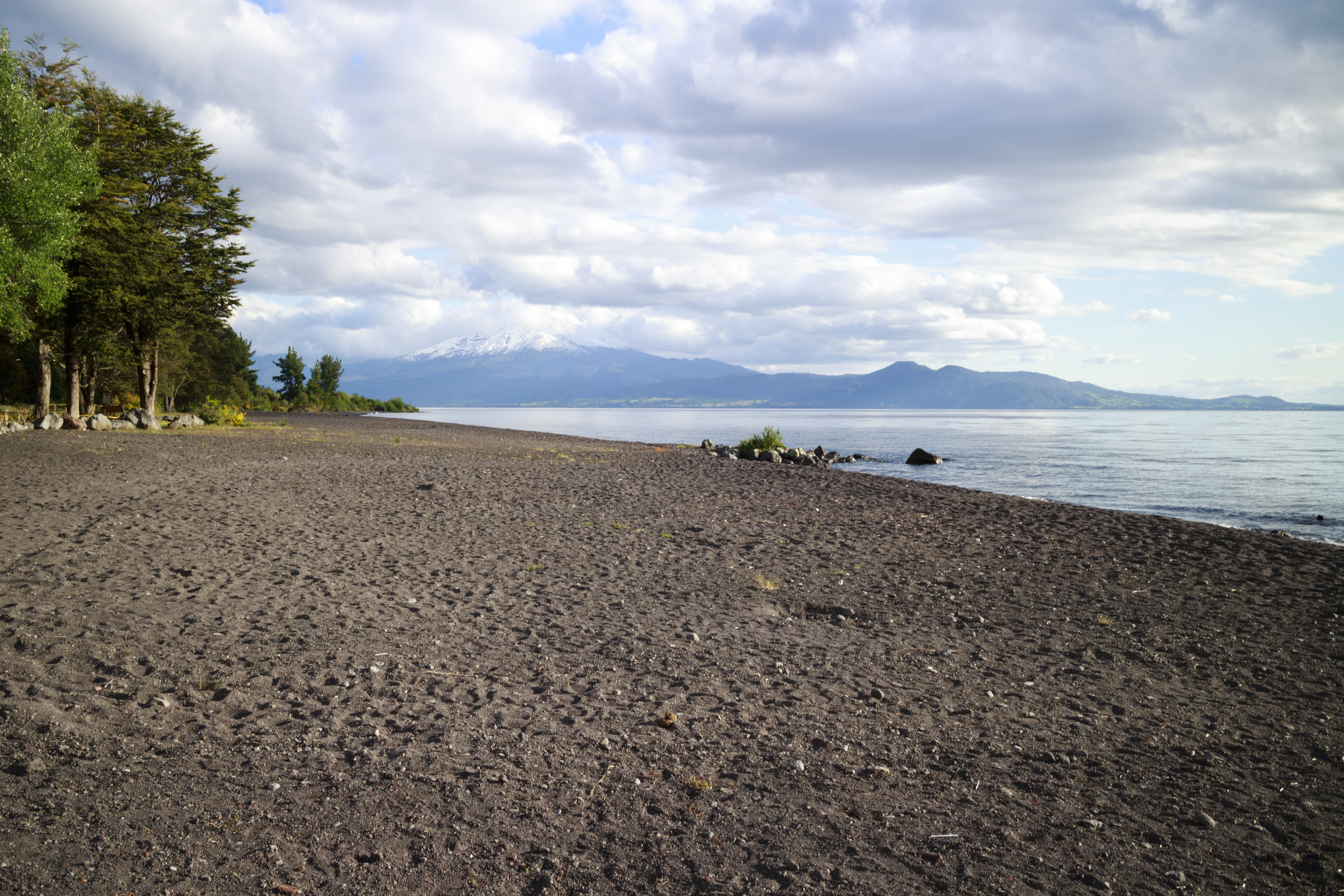 Playa de Las Cascadas, en el lago Llanquihue, comuna de Puerto Octay, Chile.